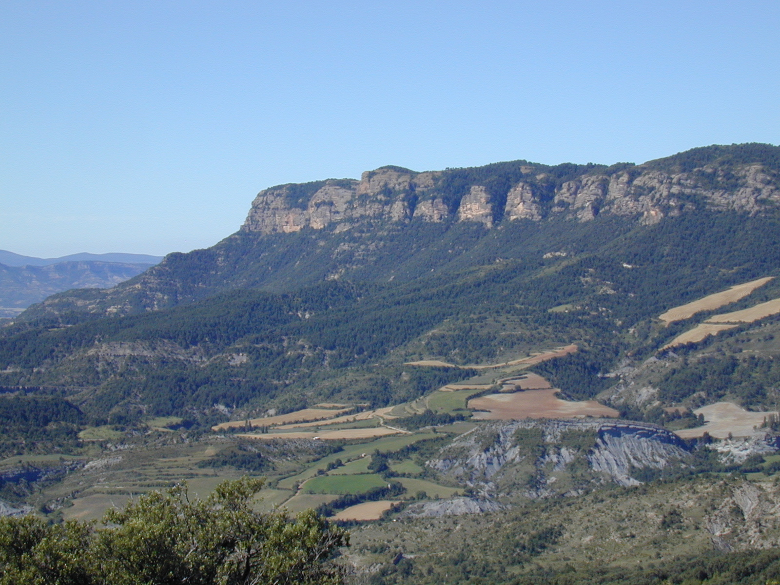 Serra entre l'interfluvi Cinca-Isàvena, disposada en direcció NW-SE, i altures que oscil·len entre els 1.420 de la Serra de Esdolomada i els 1.401 del Morrón de Güell (o Güel).